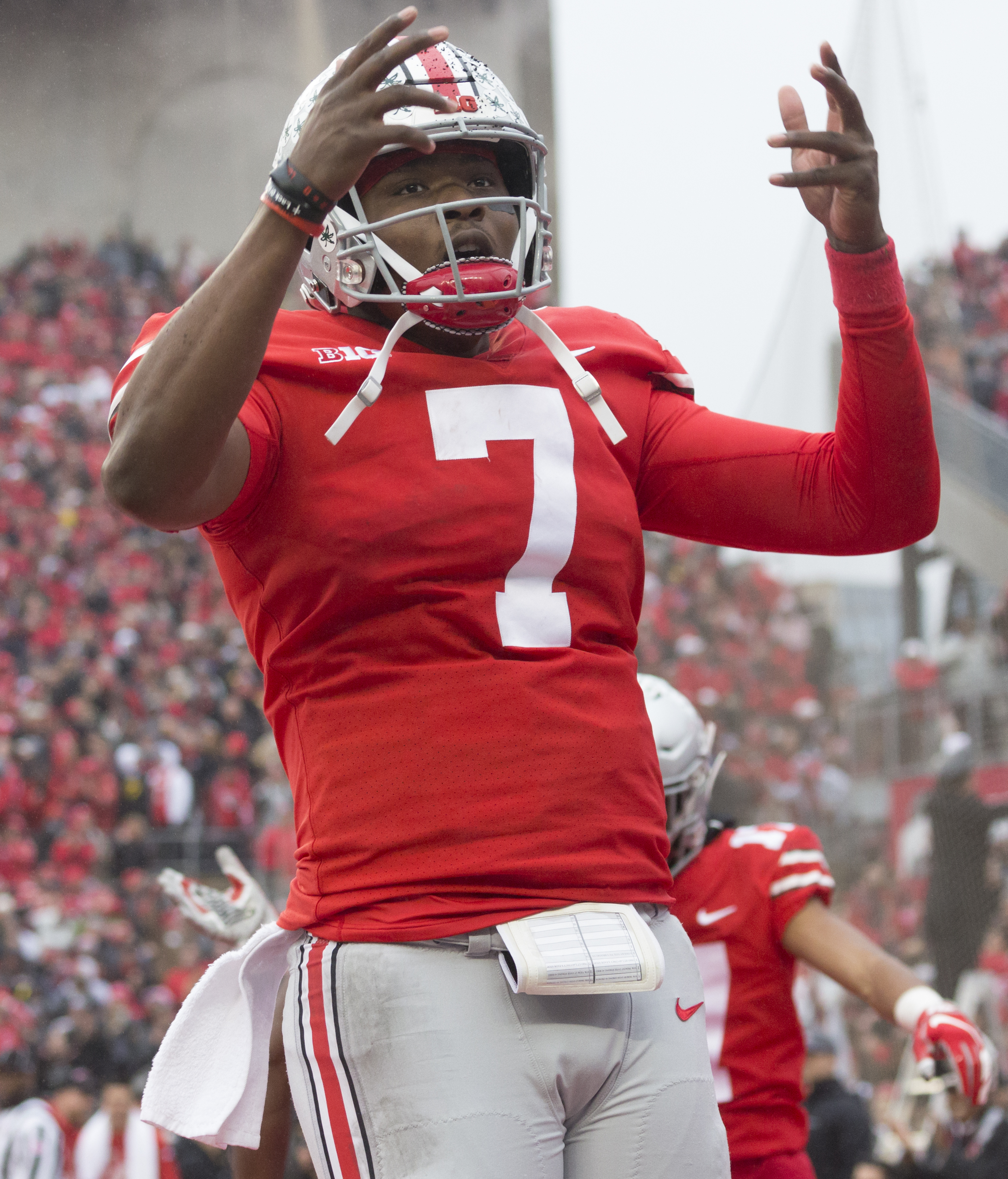 IX8A4446